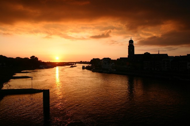 JPG O.b.v. eEigen foto: T.C. Nijeholt